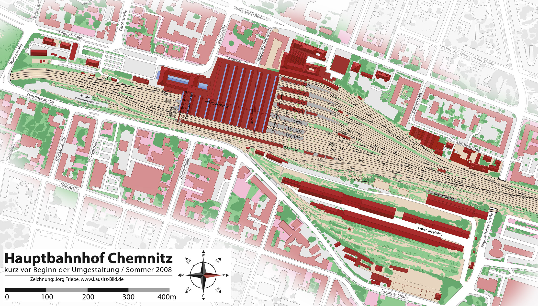 Hauptbahnhof Chemnitz im Sommer 2008 (kurz vor der Umgestaltung)